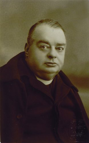 Vinko Vodopivec, slovenski skadatelj in zborovodja. Slika iz leta 1932.